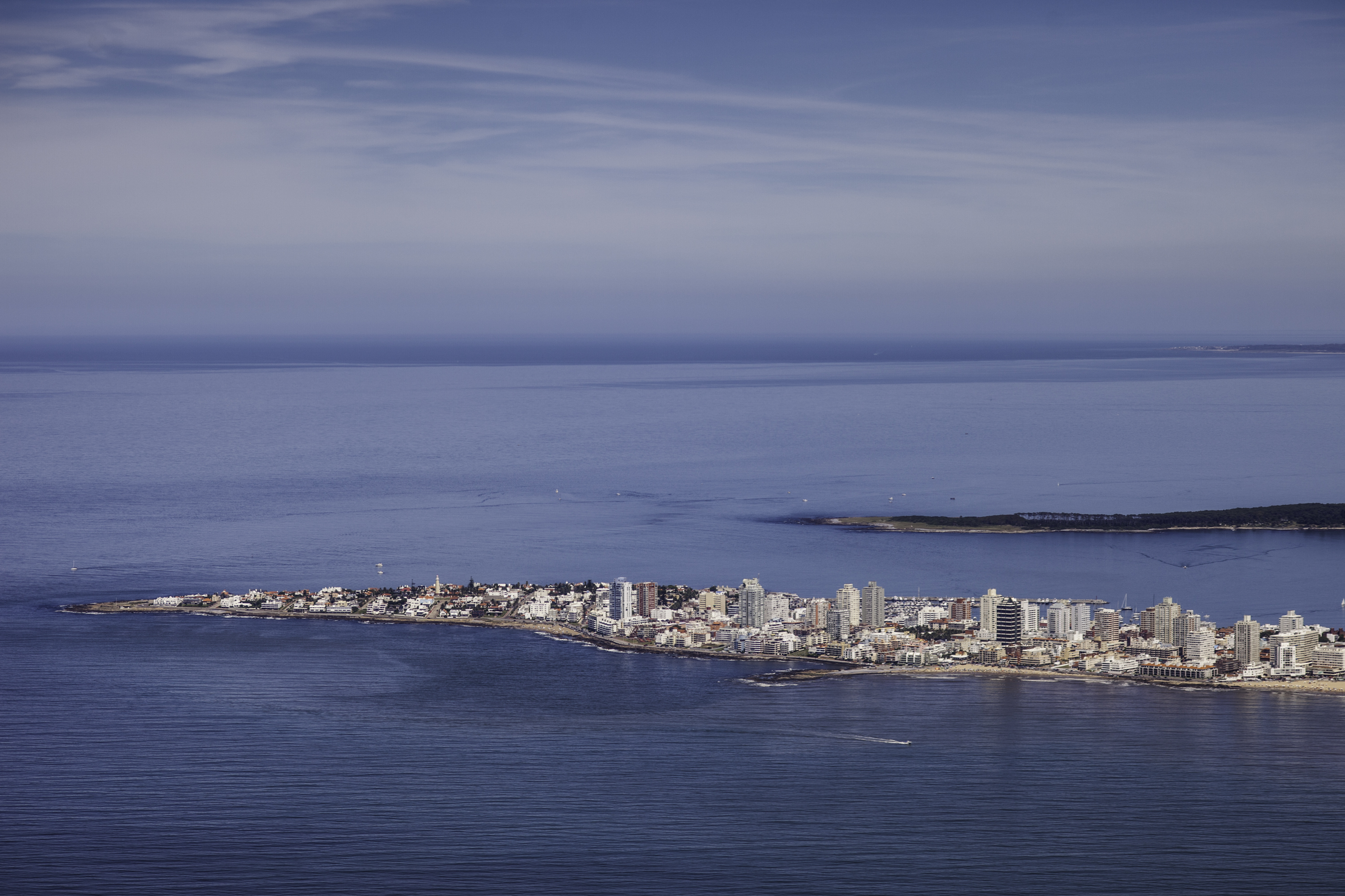 Vista aérea de Punta del este.